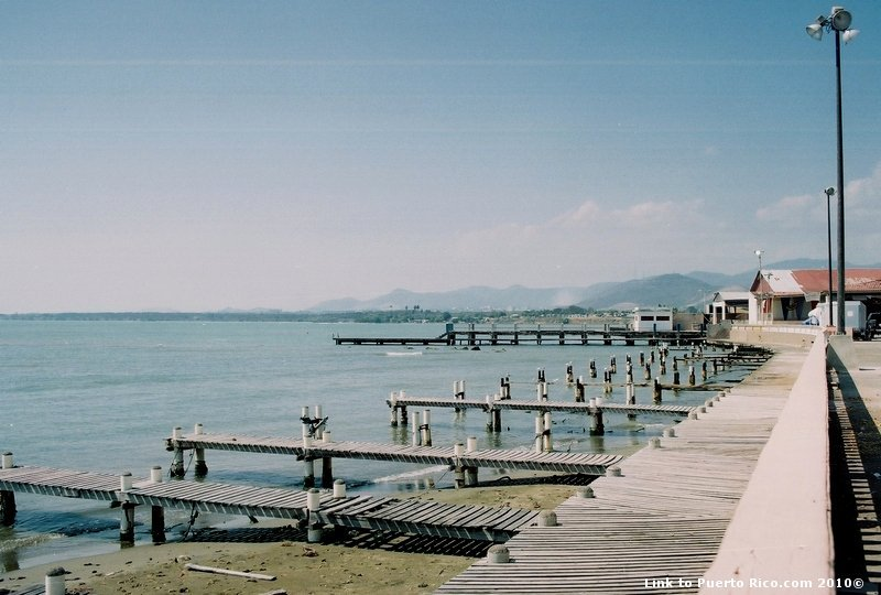 Arroyo está ubicado en la costa sureste de Puerto Rico. Limita al norte con el municipio de Patillas, al sur con el Mar Caribe, al oeste con Guayama y al este con Patillas.